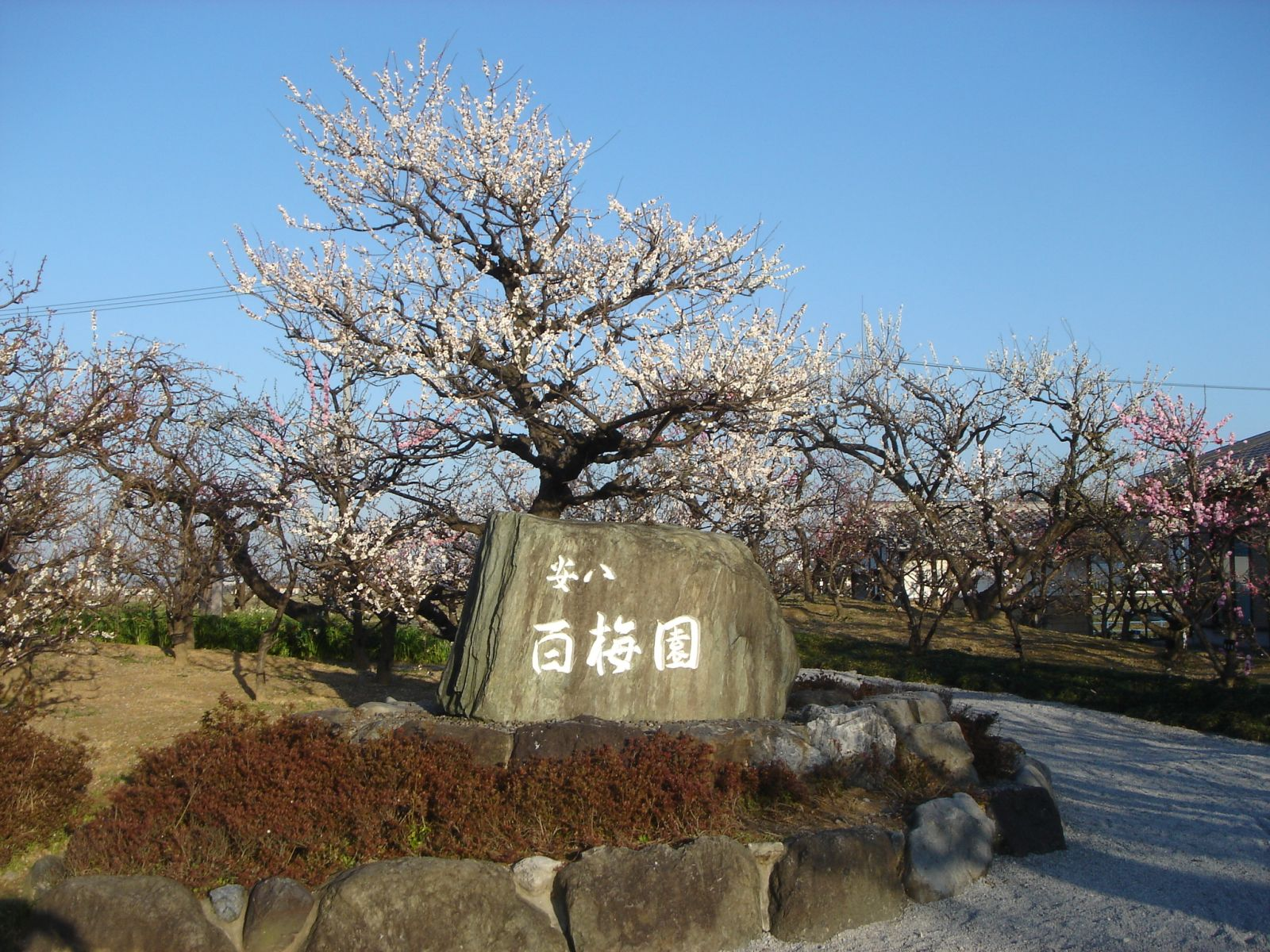 Anpachi Hyaku-baien(安八百梅園),Anpachi,Gifu,Japan(岐阜県安八町)で撮影